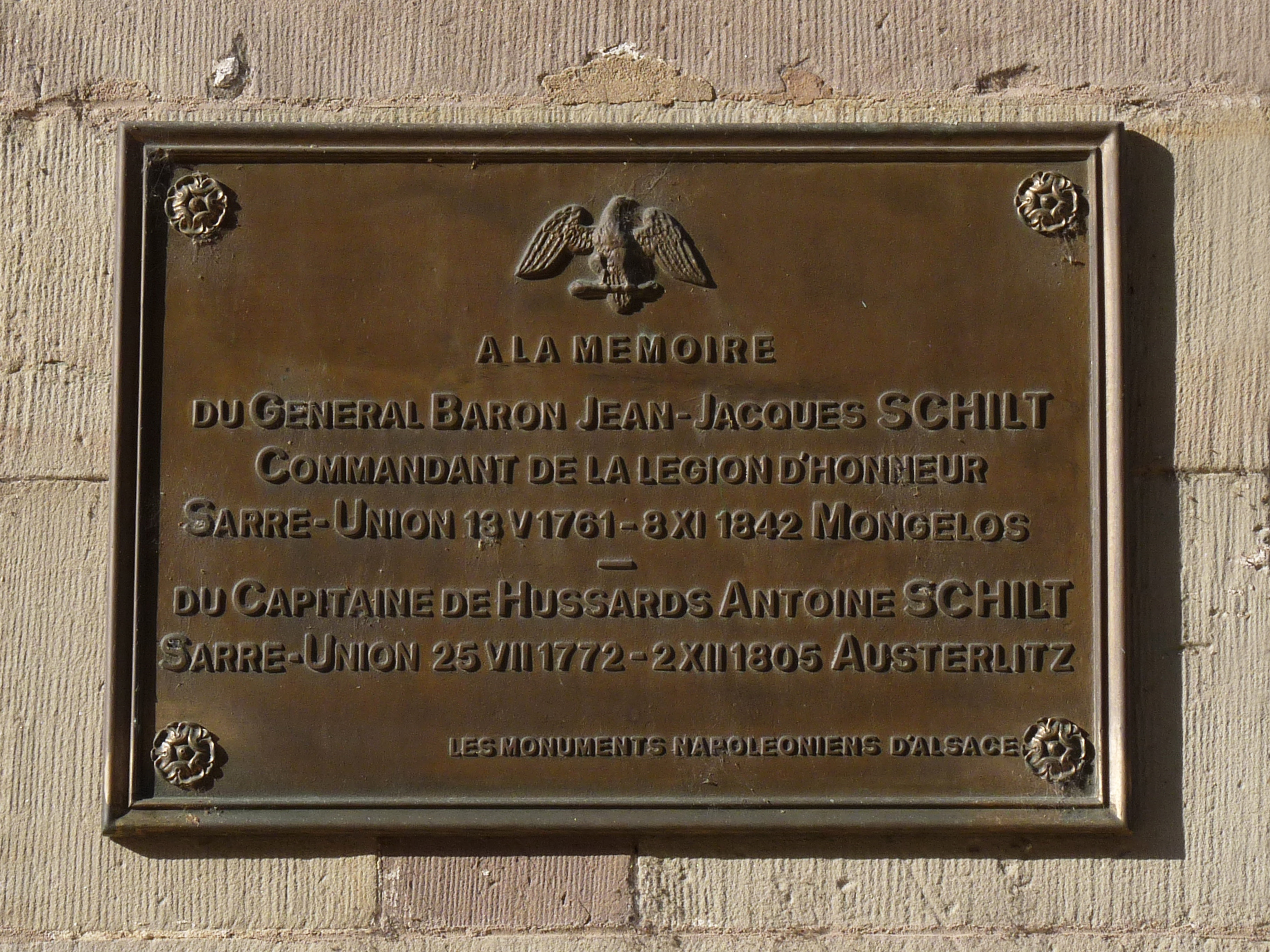 Sarre-Union : plaque à la mémoire du général baron Jean-Jacques Schilt et du capitaine de hussards Antoine Schilt, nés à Sarre-Union respectivement en 1761 et 1772